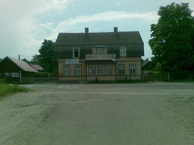 Viinistu rannapood.